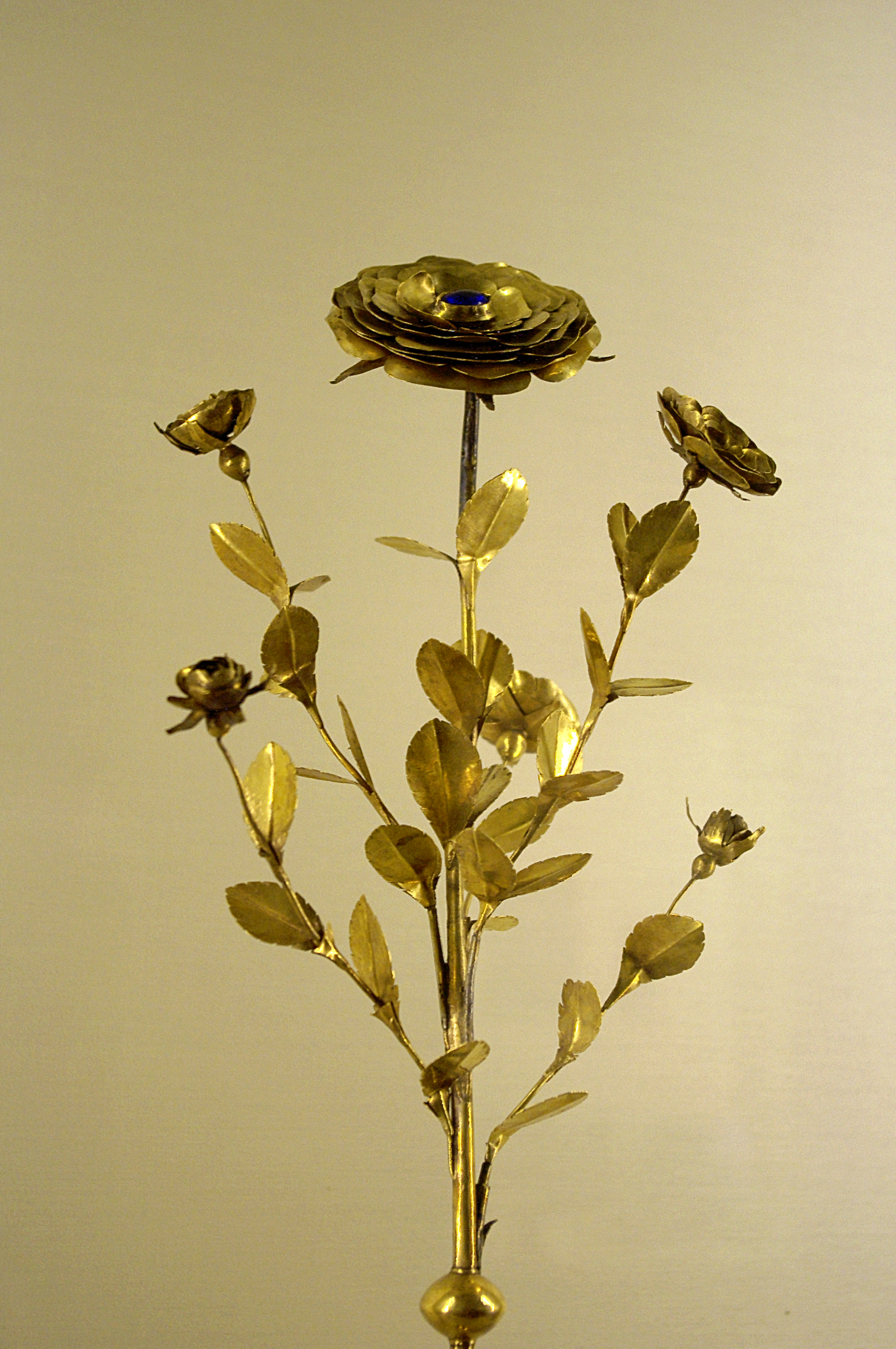 Musée de Cluny, Paris. - Minucchio da Siena Rose d'or. Rose : Avignon, 1330 ; nœud filigrané : troisième quart du XIIIe siècle; pied et écus émaillés : après 1330 ; or, argent doré, verre coloré, émail champlevé sur argent. - Commandée par le pape Jean XXII et offerte à Rodolphe III de Nidau ; trésor de la cathédrale de Bâle.